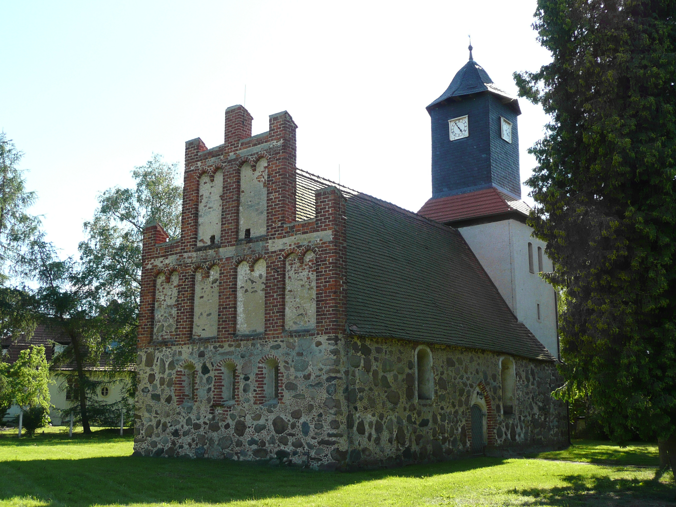 Evangelische Dorfkirche Pröttlin, Ortsteil von Karstädt